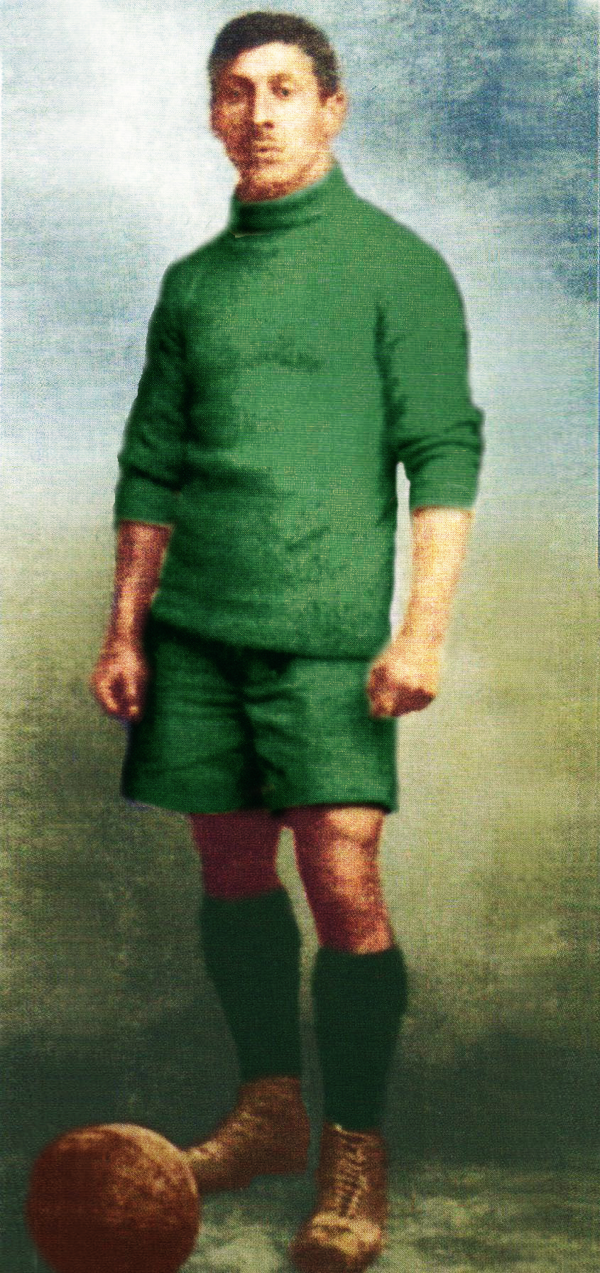 Φωτογραφία του Γιώργου Καλαφάτη κατά πρώτη δεκαετία του 1900, από άγνωστο δημιουργό. Επίσης δεν είναι γνωστό με ποιας ομάδας τα χρώματα αγωνίζεται. Η φωτογραφία είναι επαξεργασμένη χρωματικά από το χρήστη Sportingn. Στην πρωτότυπη φωτογραφία η εμφάνιση φέρει ανοικτόχρωμα χρώματα.